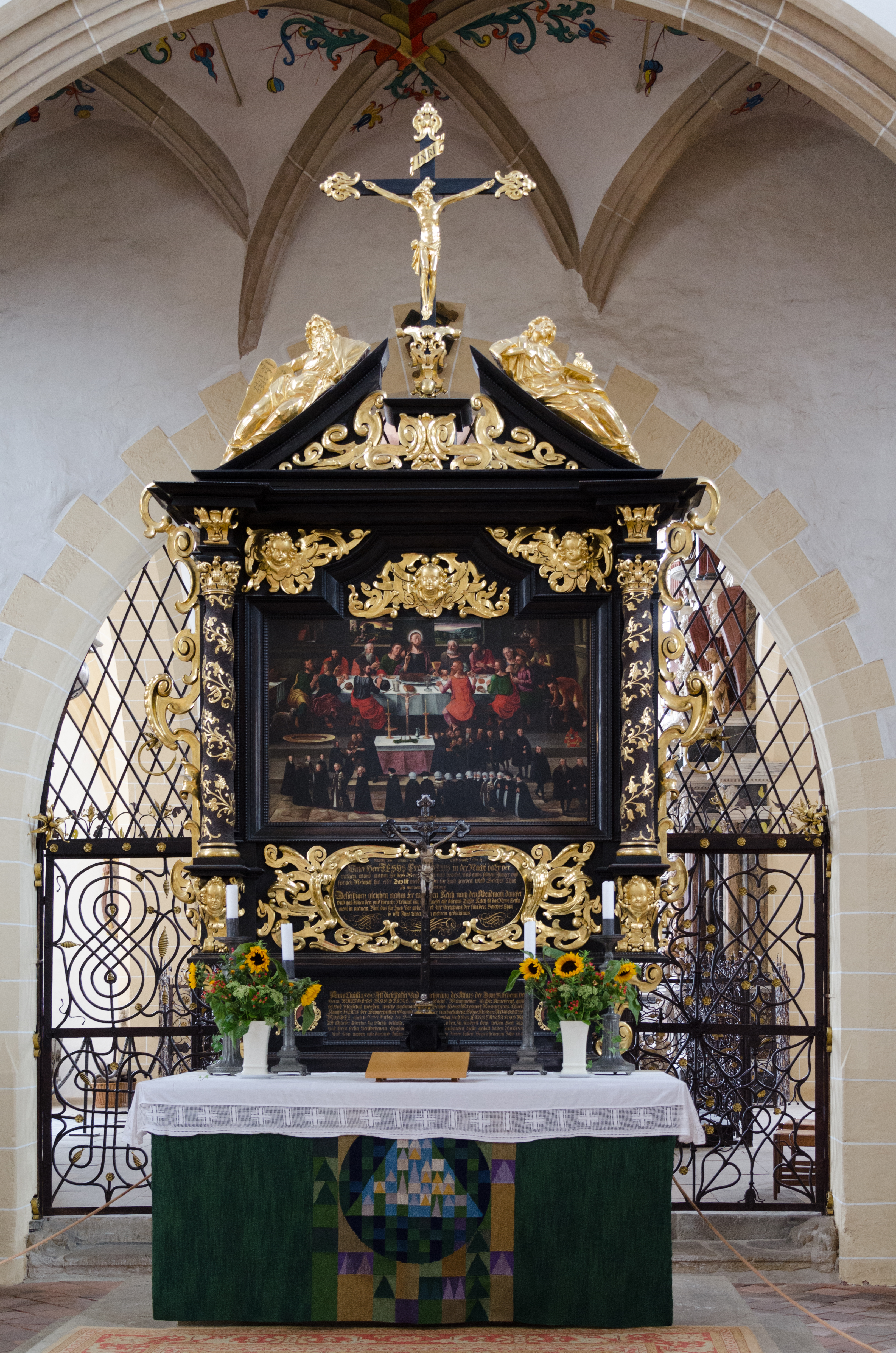 Freiberger Dom